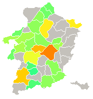 Locatie van Finse pistes in de Belgische provincie Limburg (met kleurschakering voor afstandsgradering). Indien er meerdere pistes aanwezig zijn wordt de langste weergegeven.